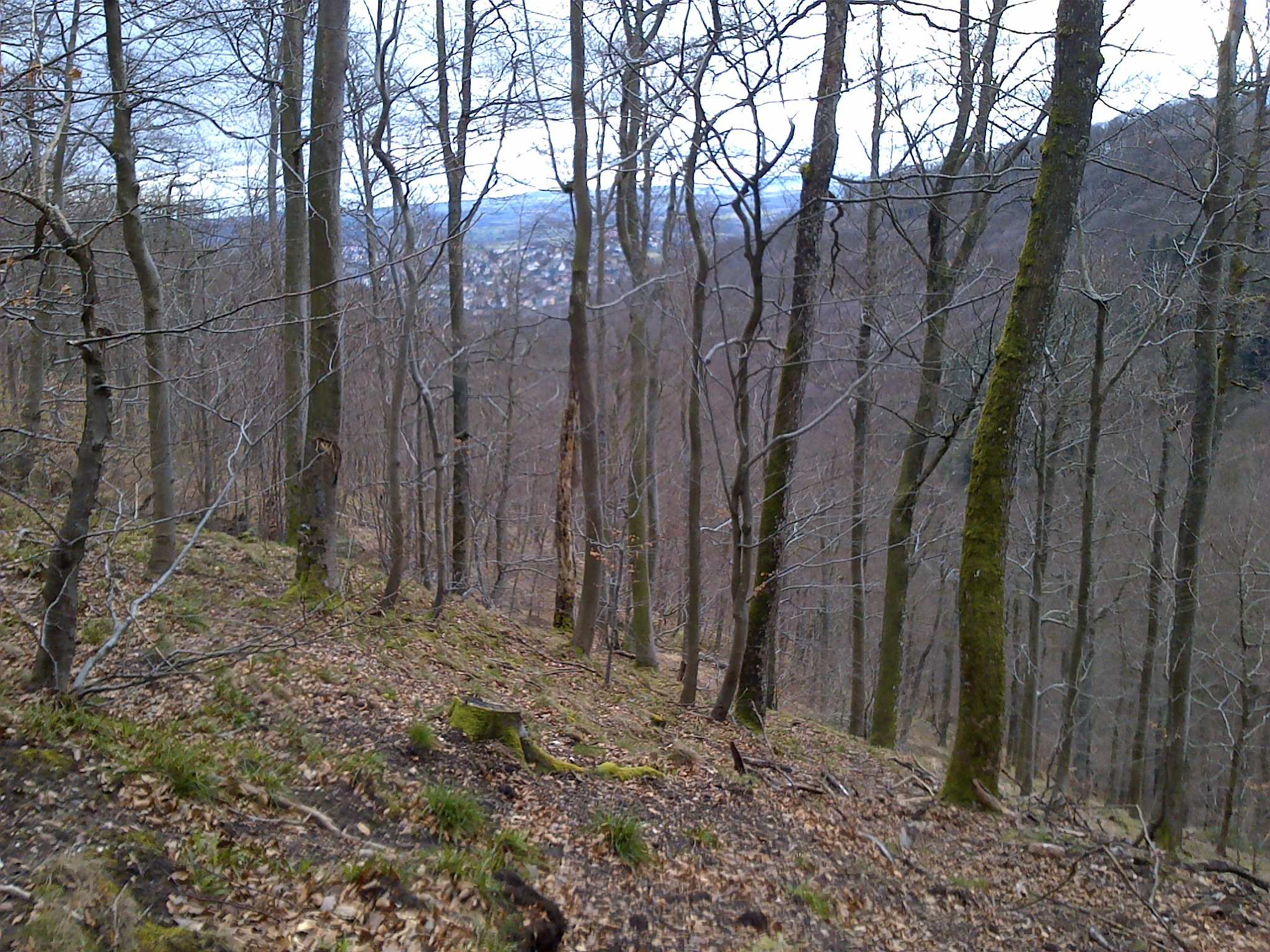 Col de Saverne - Randonnée Club Vosgien